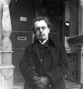 Фото психолога та літературознавця